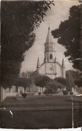 Iglesia de la Merced, Merlo, primera mitad del siglo 20.